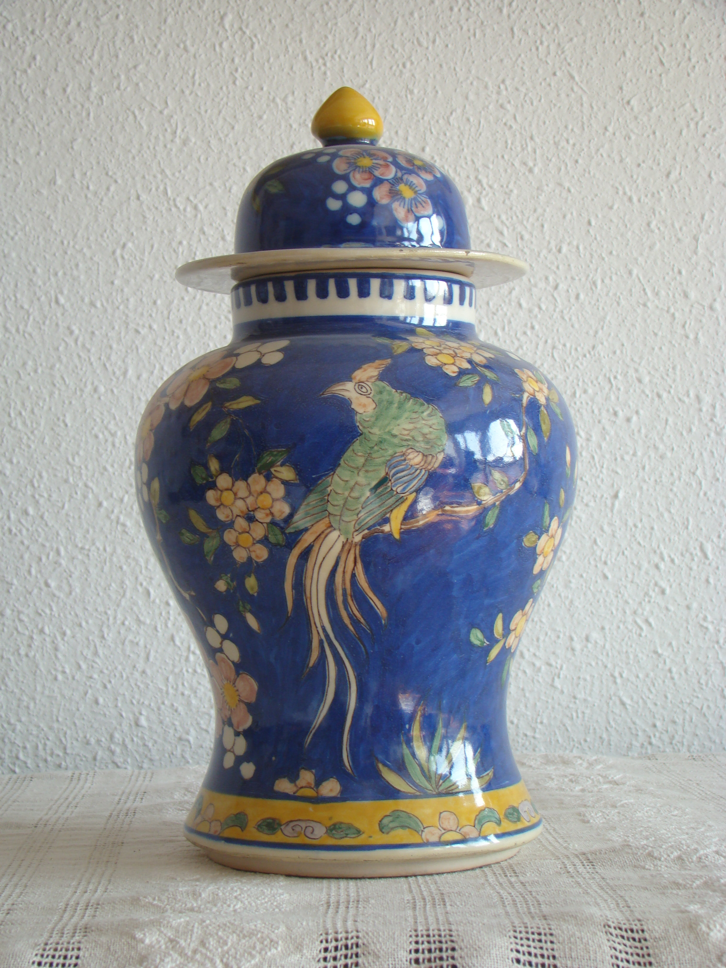 Tibor de cerámica valenciana tipo Manises, c. 1950. Valencia, España.